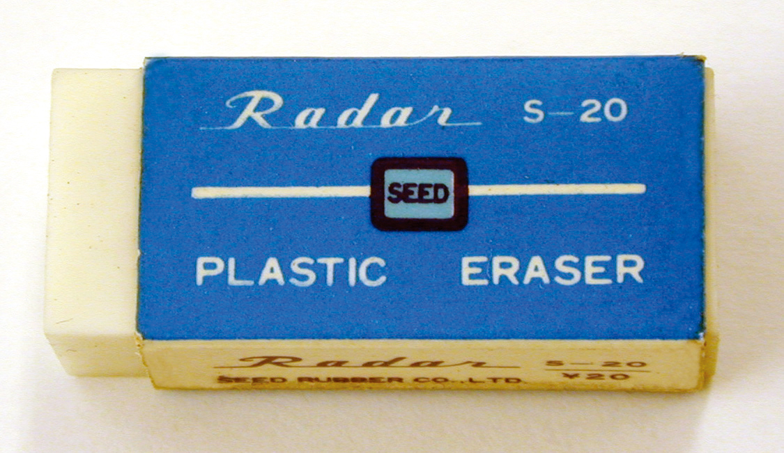 1968年販売当初のモデル